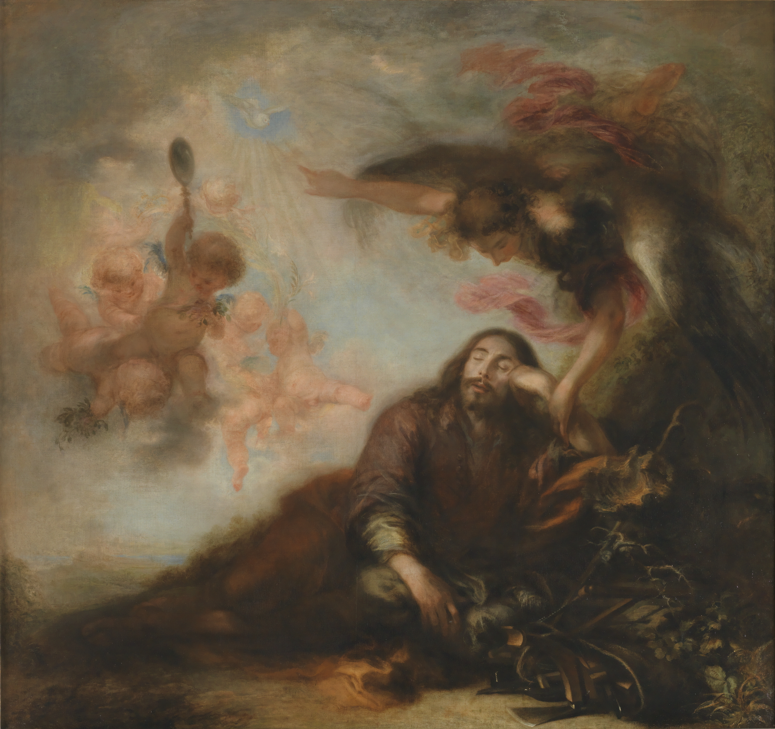 La obra representa el momento en que San José, el esposo de la Virgen María, fue avisado en sueños de que huyera a Egipto para salvar la vida del Niño Jesús, a quien el rey Herodes el Grande pretendía asesinar.